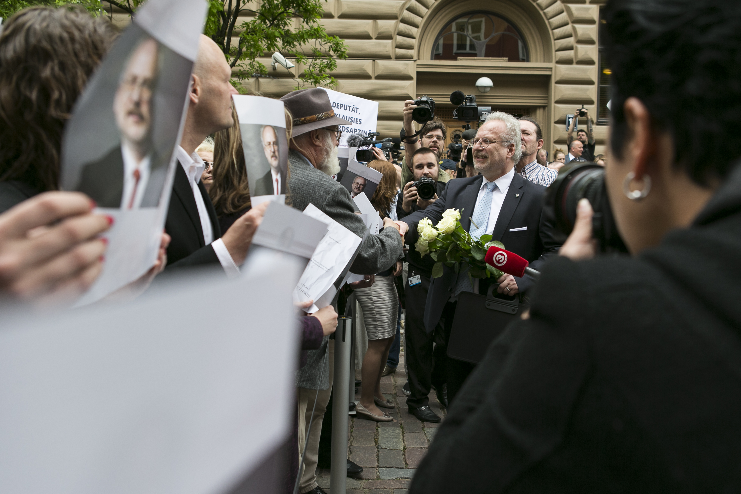 2015.gada 3.jūnijs. Valsts prezidenta vēlēšanas. Foto: Ernests Dinka, Saeimas Kanceleja Izmantošanas noteikumi: saeima.lv/lv/autortiesibas